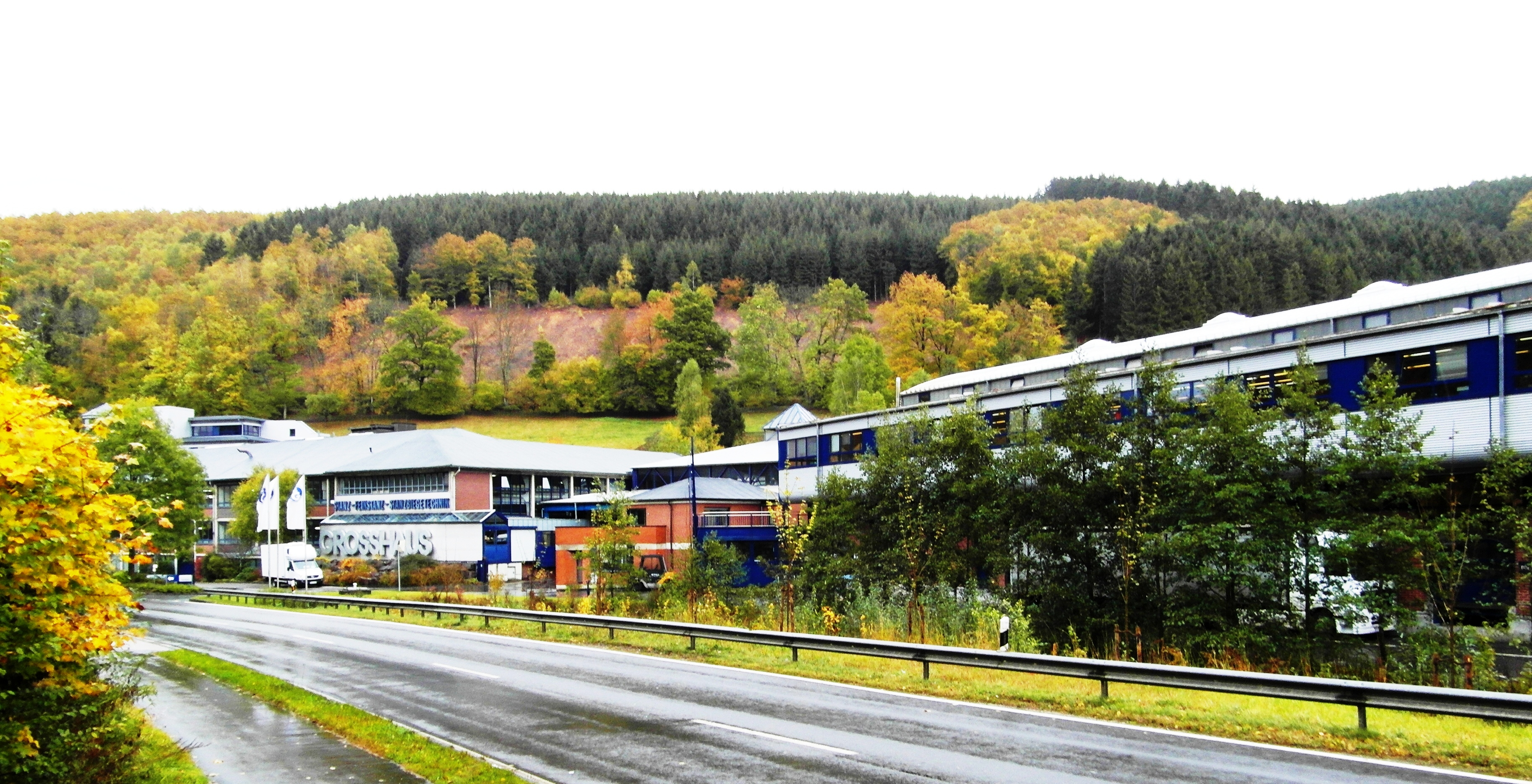 Gelände der Firma Egon Grosshaus in Bonzellerhammer an der B55